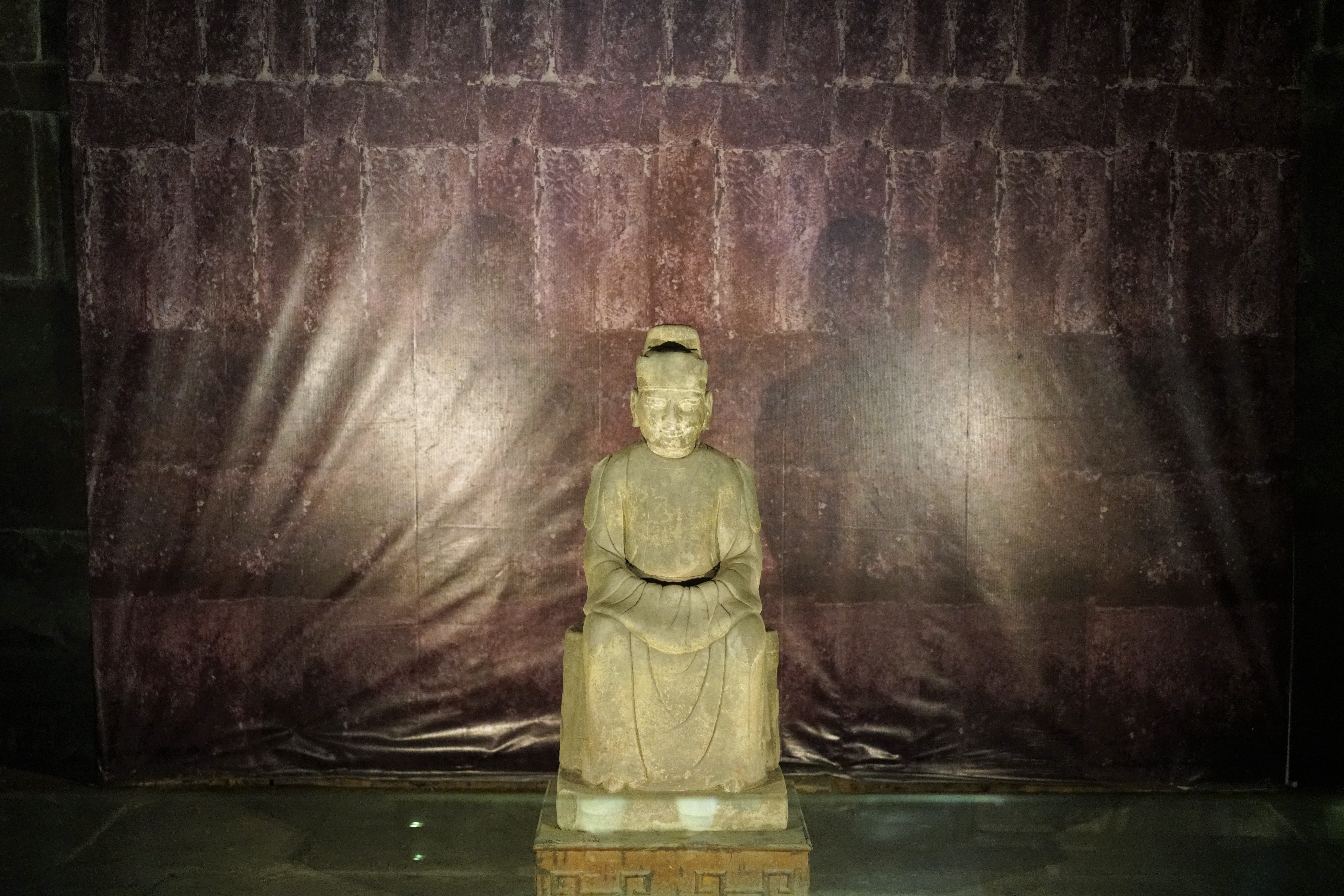 中文（中国大陆）: 永陵王建像